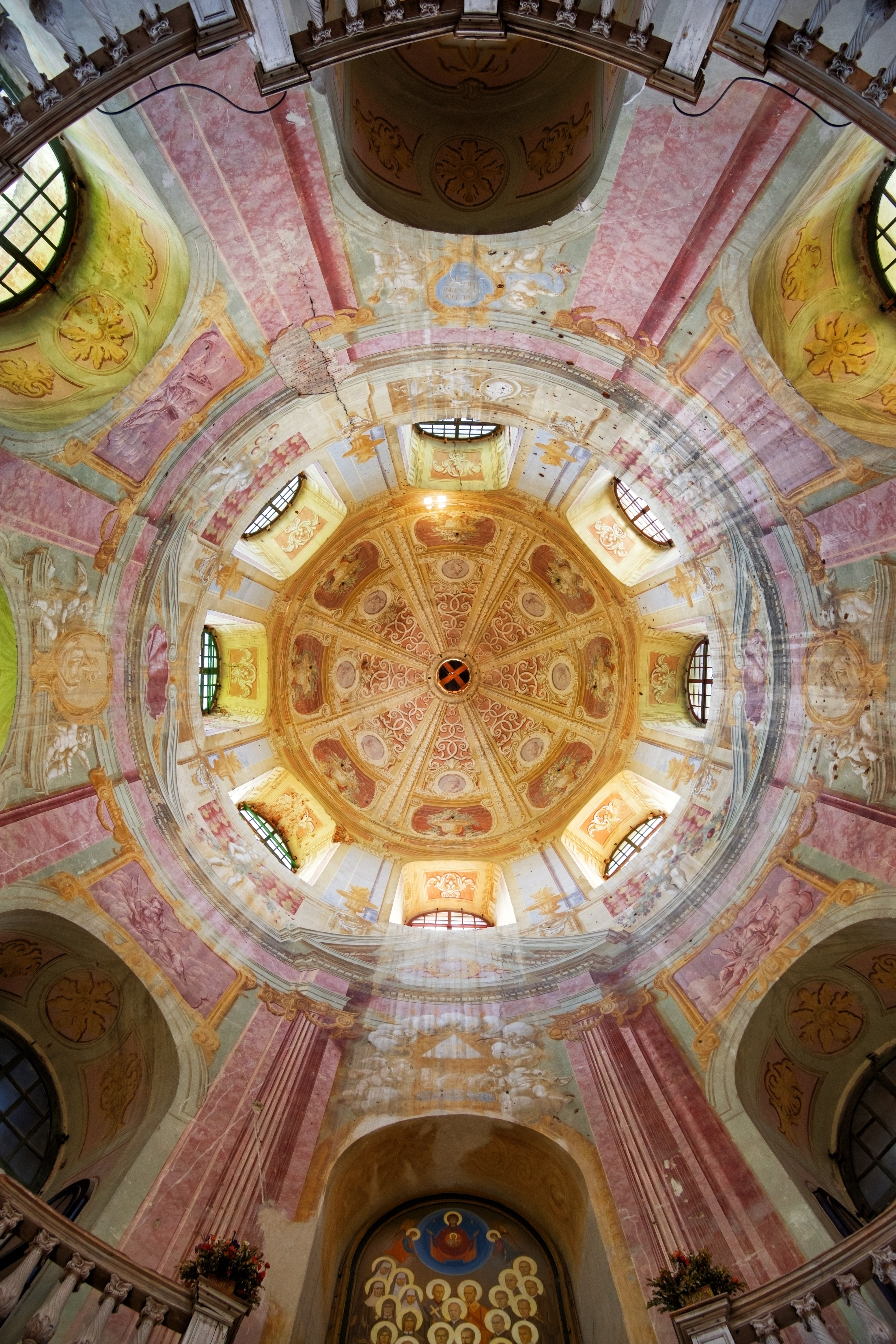 Костел Святого Йосифа, Підгірці